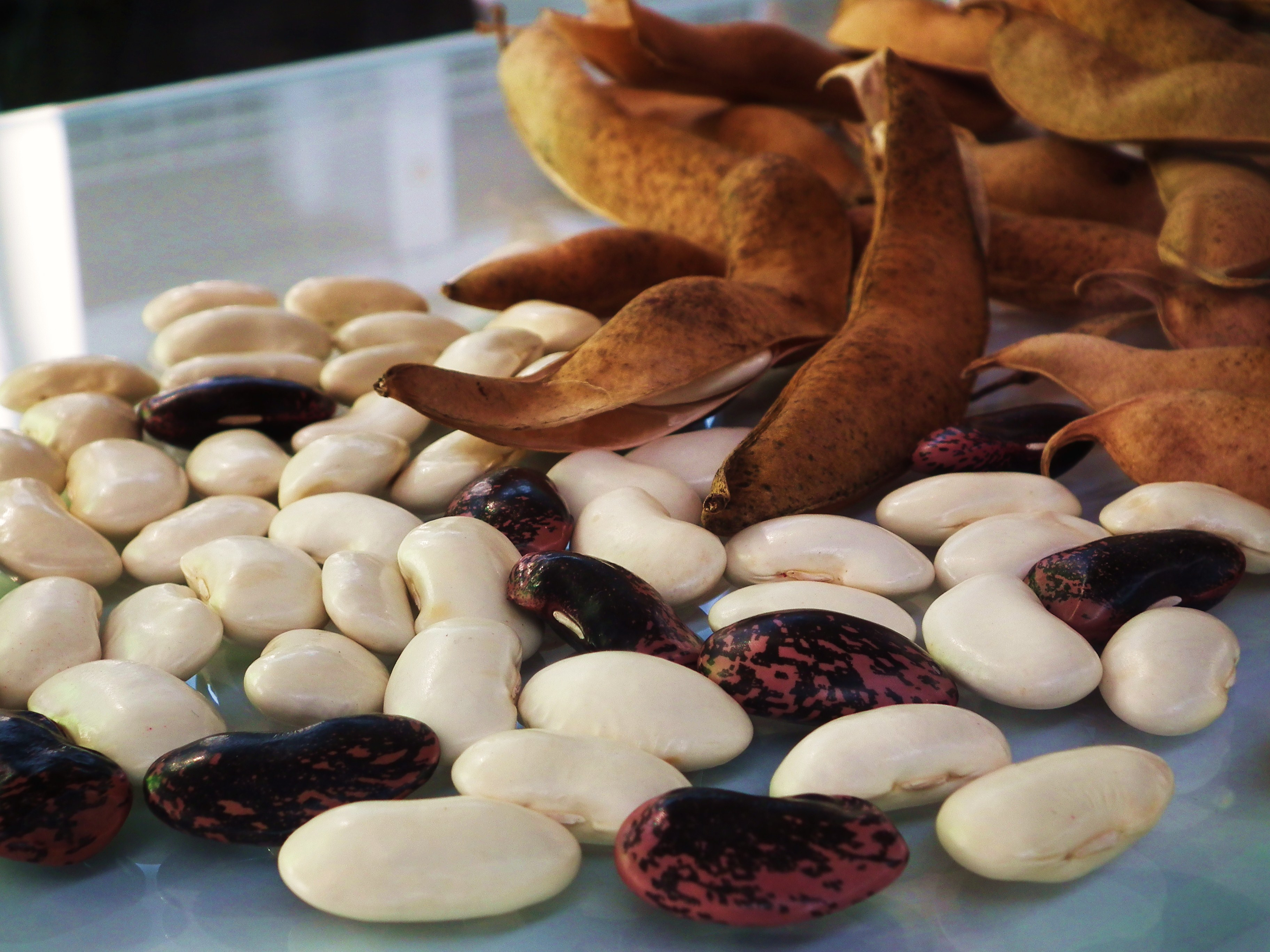 Targi Smaki Regionów 2016 w Poznaniu.